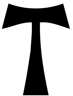 Imagem da cruz de Tau, cruz usada por São Francisco de Assis para assinatura. Tau or St. Anthony's Cross.